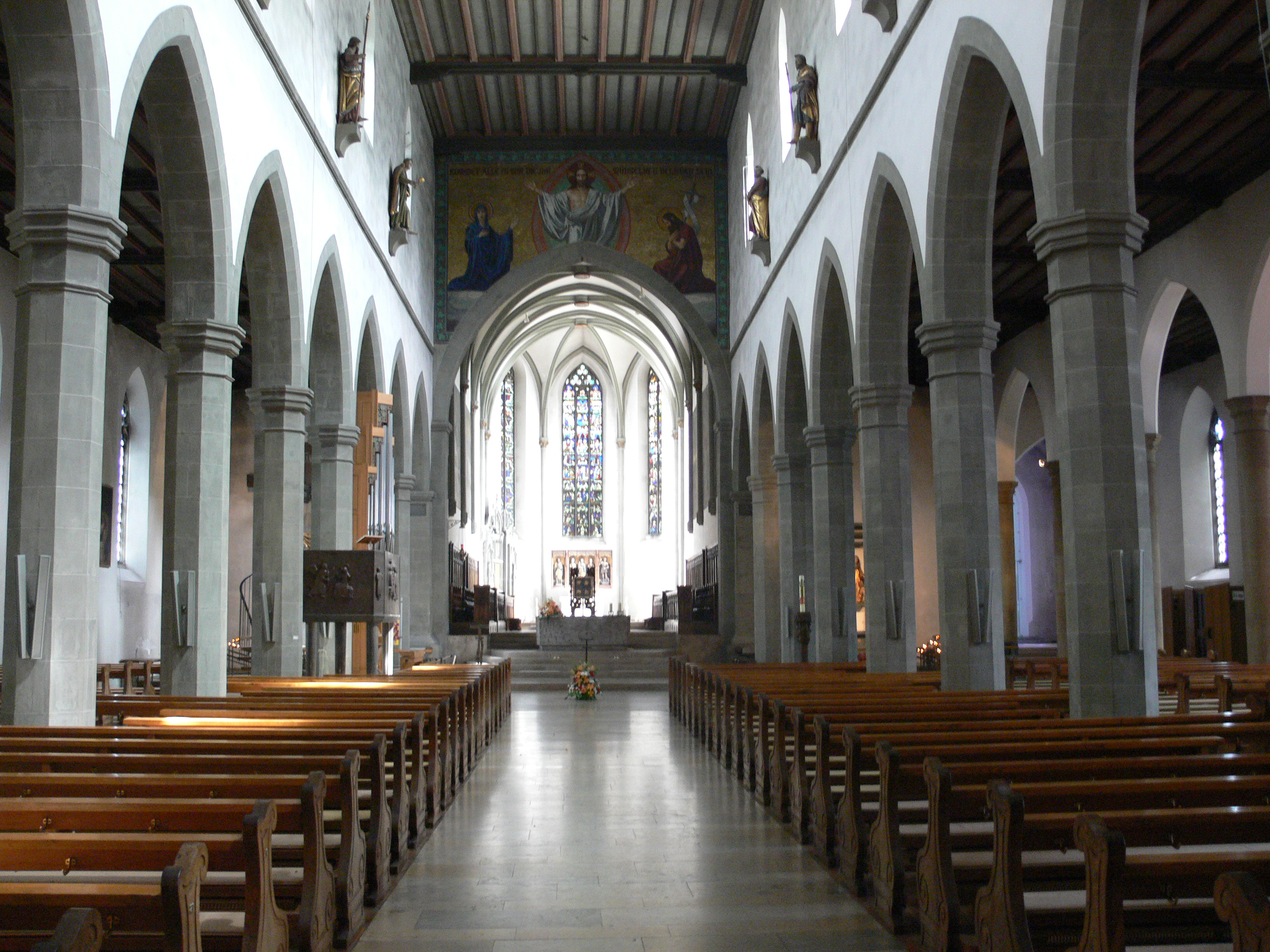 Liebfrauenkirche, Ravensburg Hauptschiff, Blick zum Chor